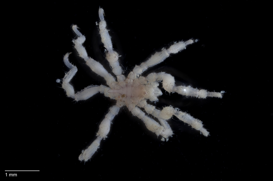 Achelia assimilis